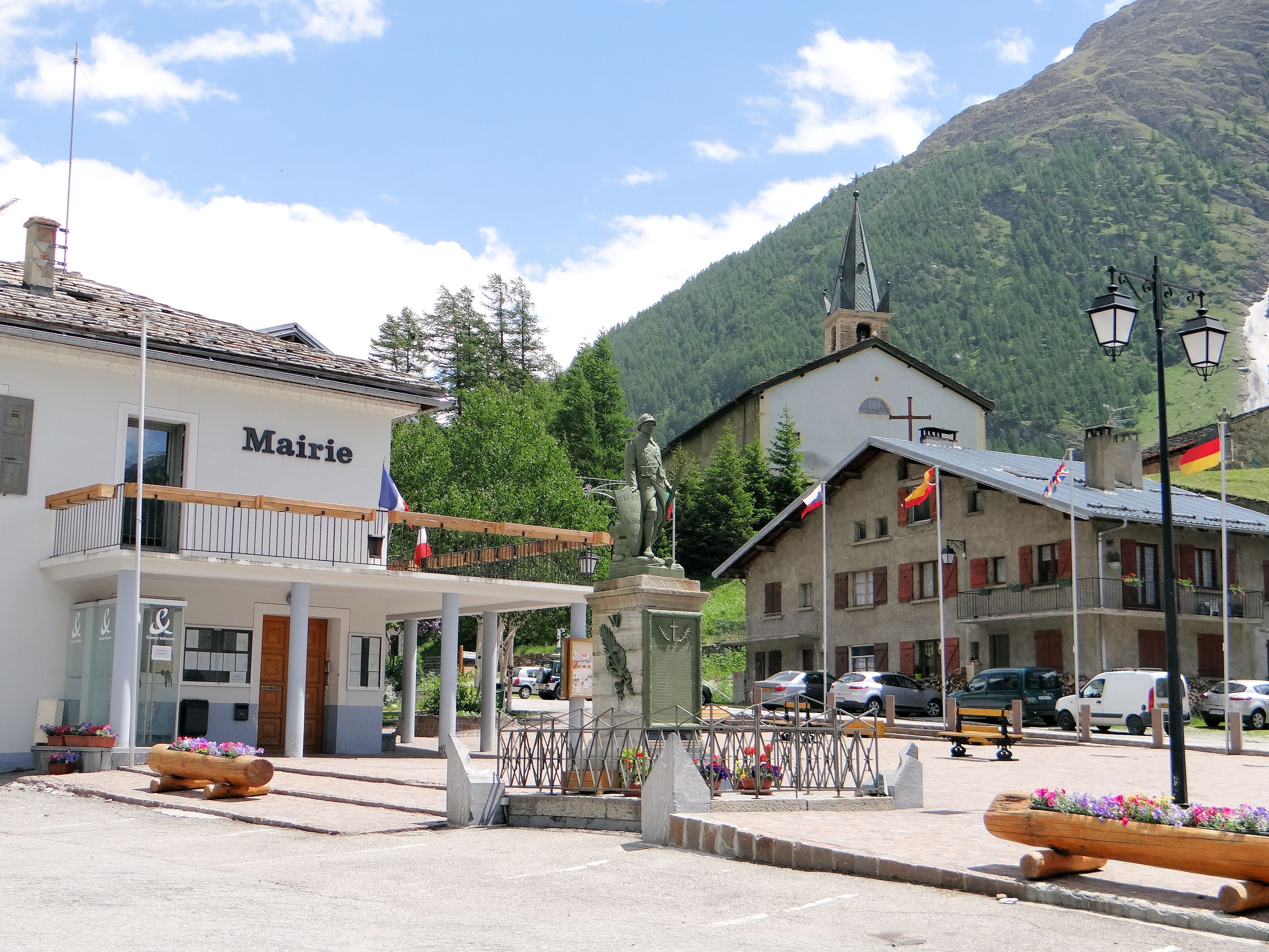 Bessans - La mairie, le monument aux Morts et l'église Saint-Jean-Baptiste